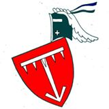 Erb rodu Hejdů z Lichnova